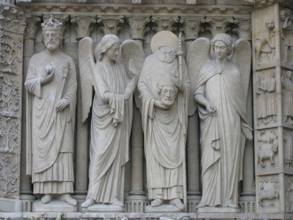 Cathédrale Notre-Dame de Paris: portail de gauche